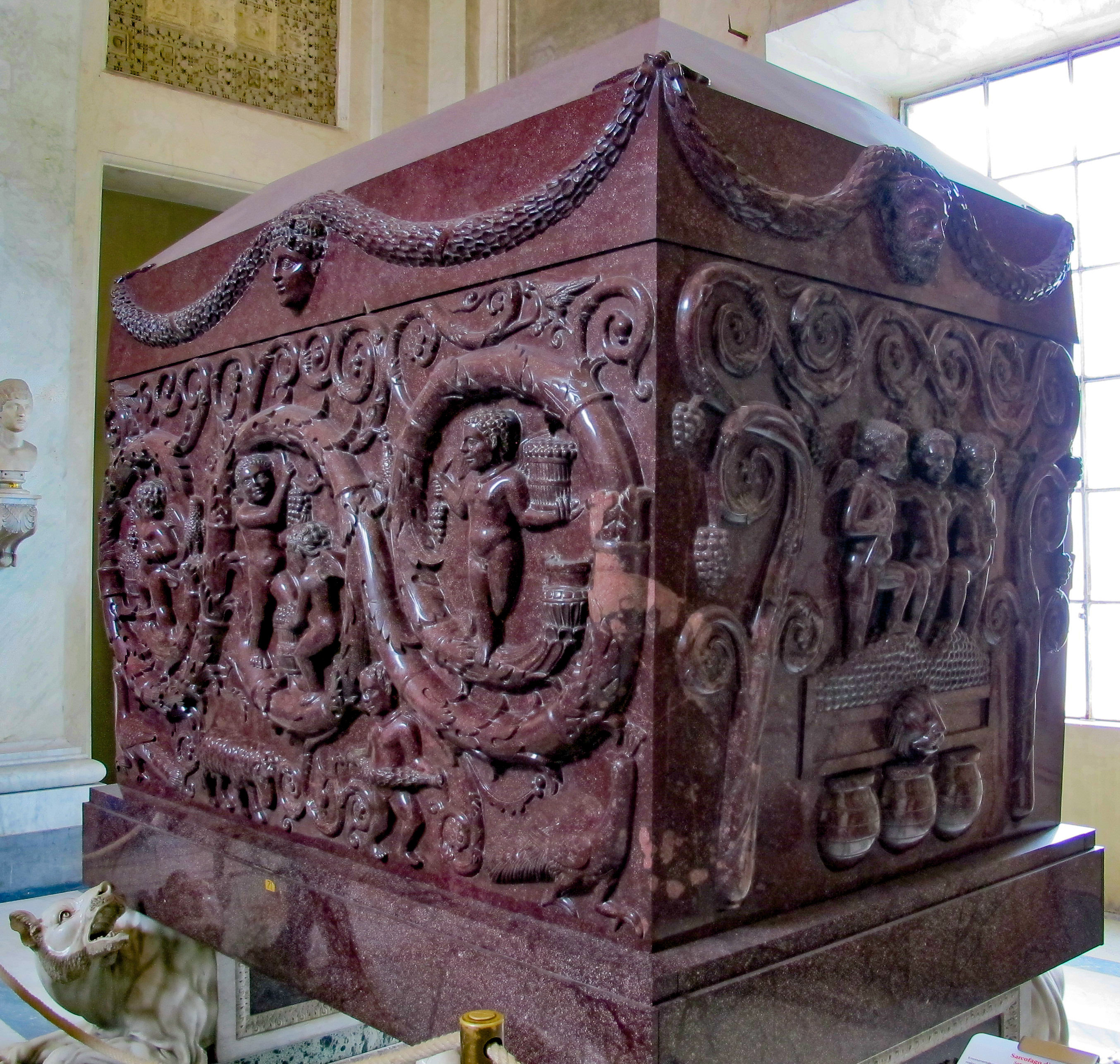 Arte romana nei Musei Vaticani